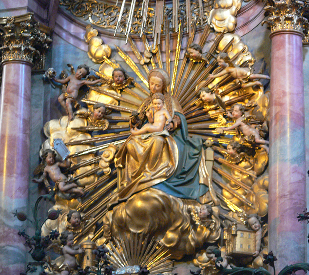 Franziskanerkirche Unserer Lieben Frau, Salzburg Hochaltar von Johann Bernhard Fischer von Erlach, 1709/1710, mit gotischer Madonna von Michael Pacher; Jesusfigur 1890 von Johann Piger hinzugefügt